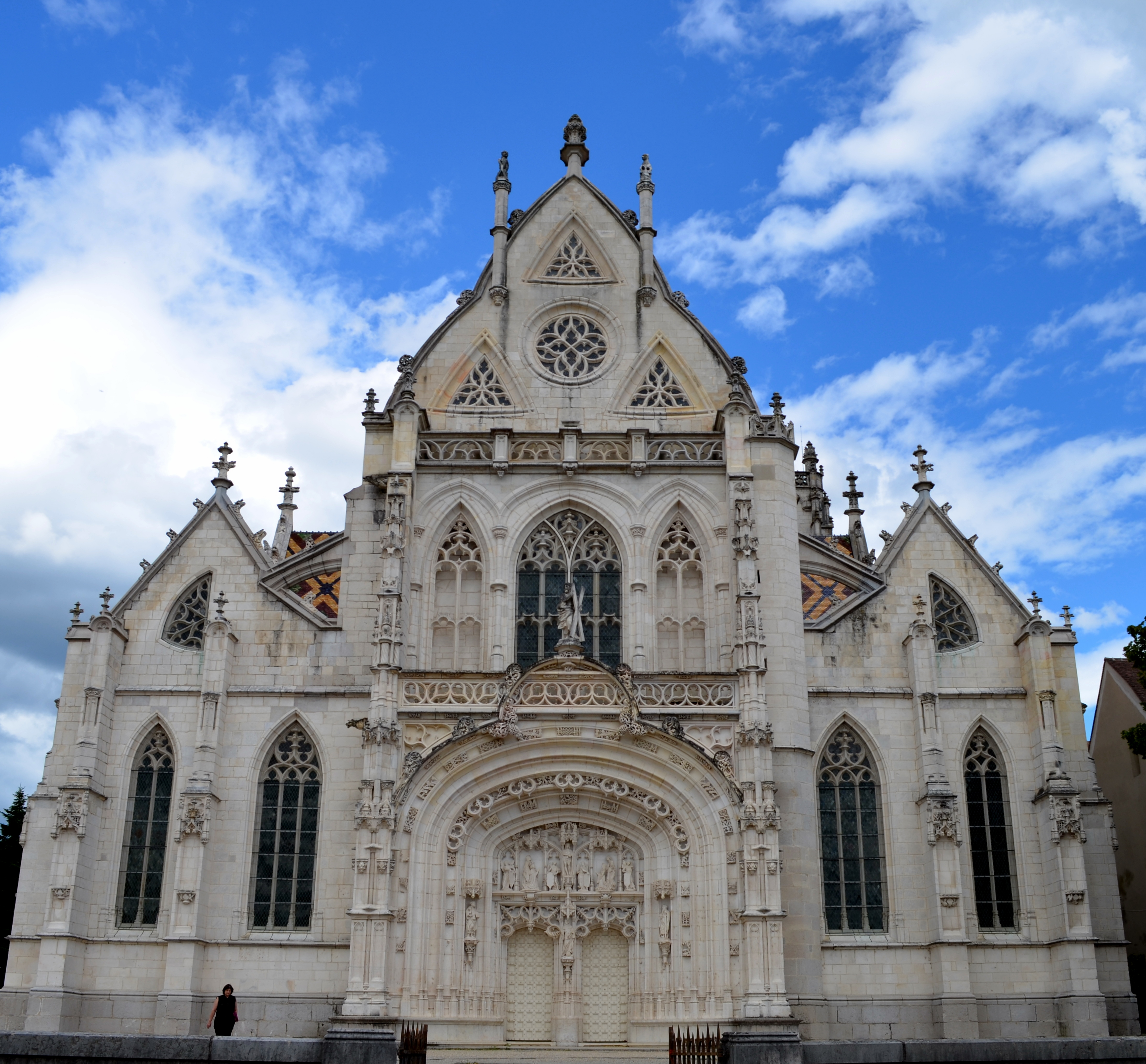 Monastère royal de Brou .